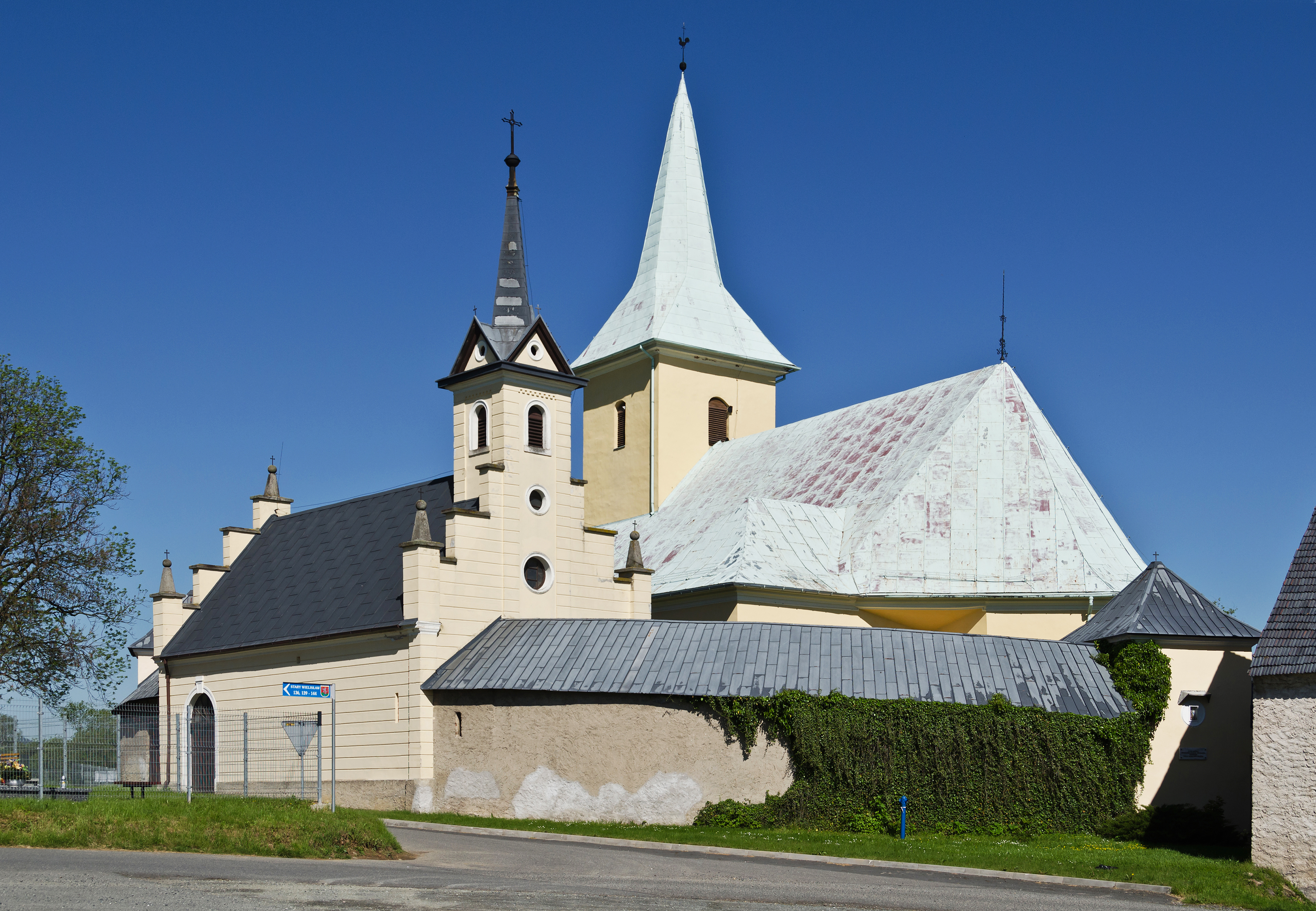 Stary Wielisław, kościół św. Wawrzyńca (dec. p.w. św. Katarzyny), XIV, XVIII